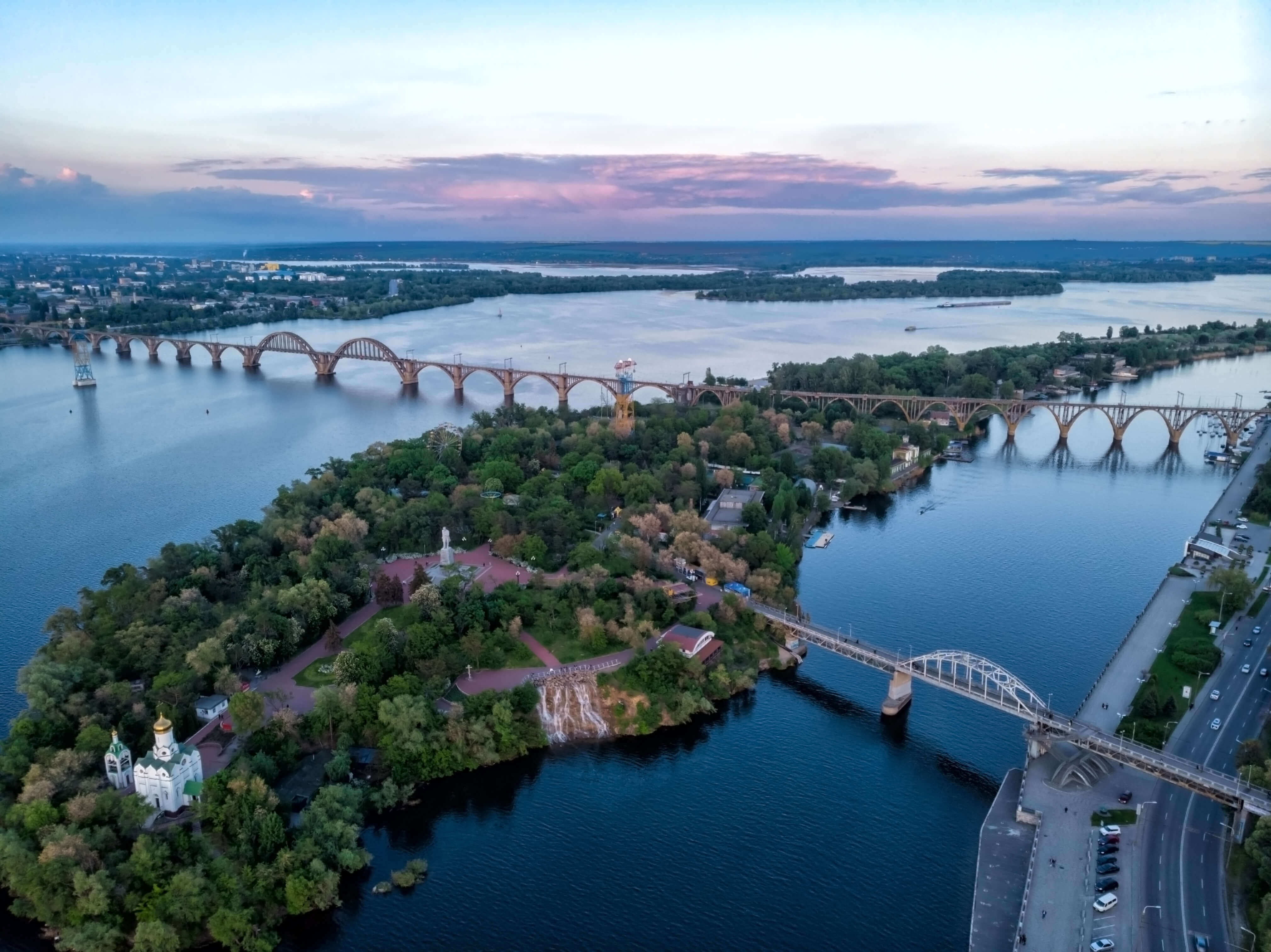 Парк ім. Шевченка, м. Дніпропетровськ пл. ім. Шевченка, 1